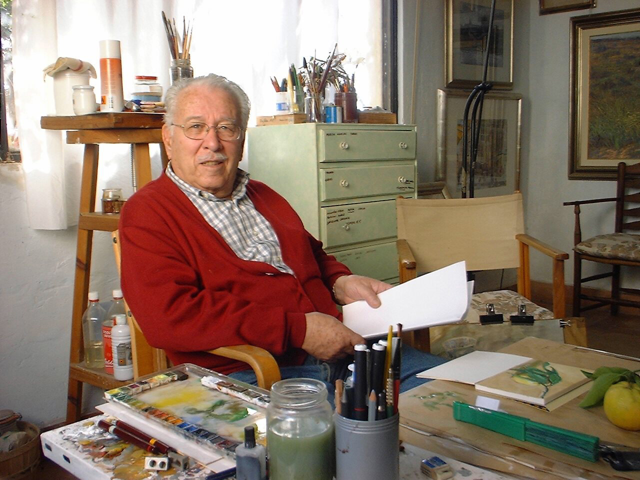 Muñoz Barberán en su estudio en el año 2001.